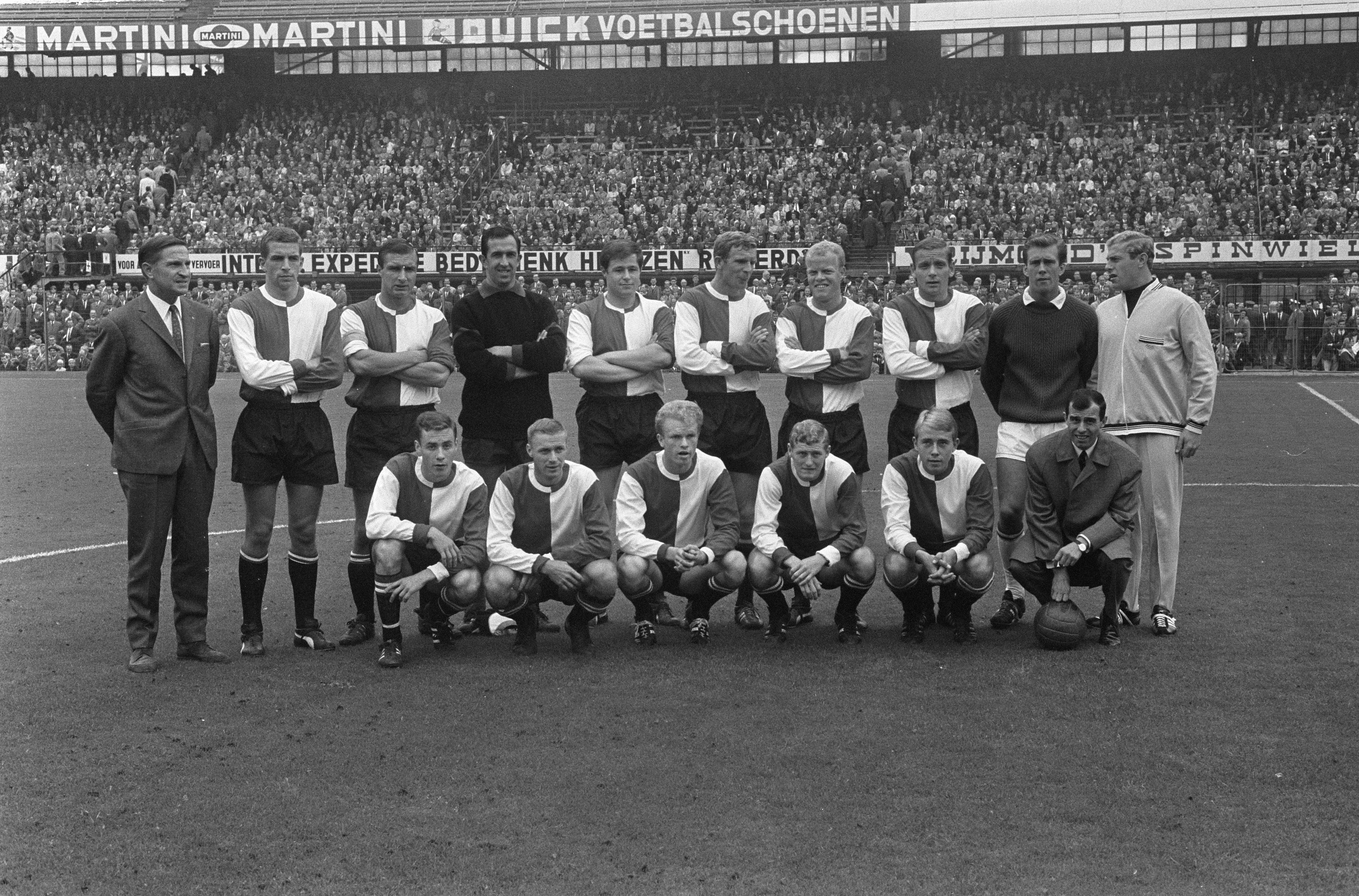 Collectie / Archief : Fotocollectie Anefo Reportage / Serie : Voetbalwedstrijd Feyenoord - Sittardia te Rotterdam: 1-0 Beschrijving : Elftal van Feyenoord Datum : 25 september 1966 Locatie : Rotterdam, Zuid-Holland Trefwoorden : elftallen, groepsportretten, sport, voetbal Instellingsnaam : Feyenoord, Sittardia Fotograaf : Fotograaf Onbekend / Anefo Auteursrechthebbende : Nationaal Archief Materiaalsoort : Negatief (zwart/wit) Nummer archiefinventaris : bekijk toegang 2.24.01.05 Bestanddeelnummer : 919-5982